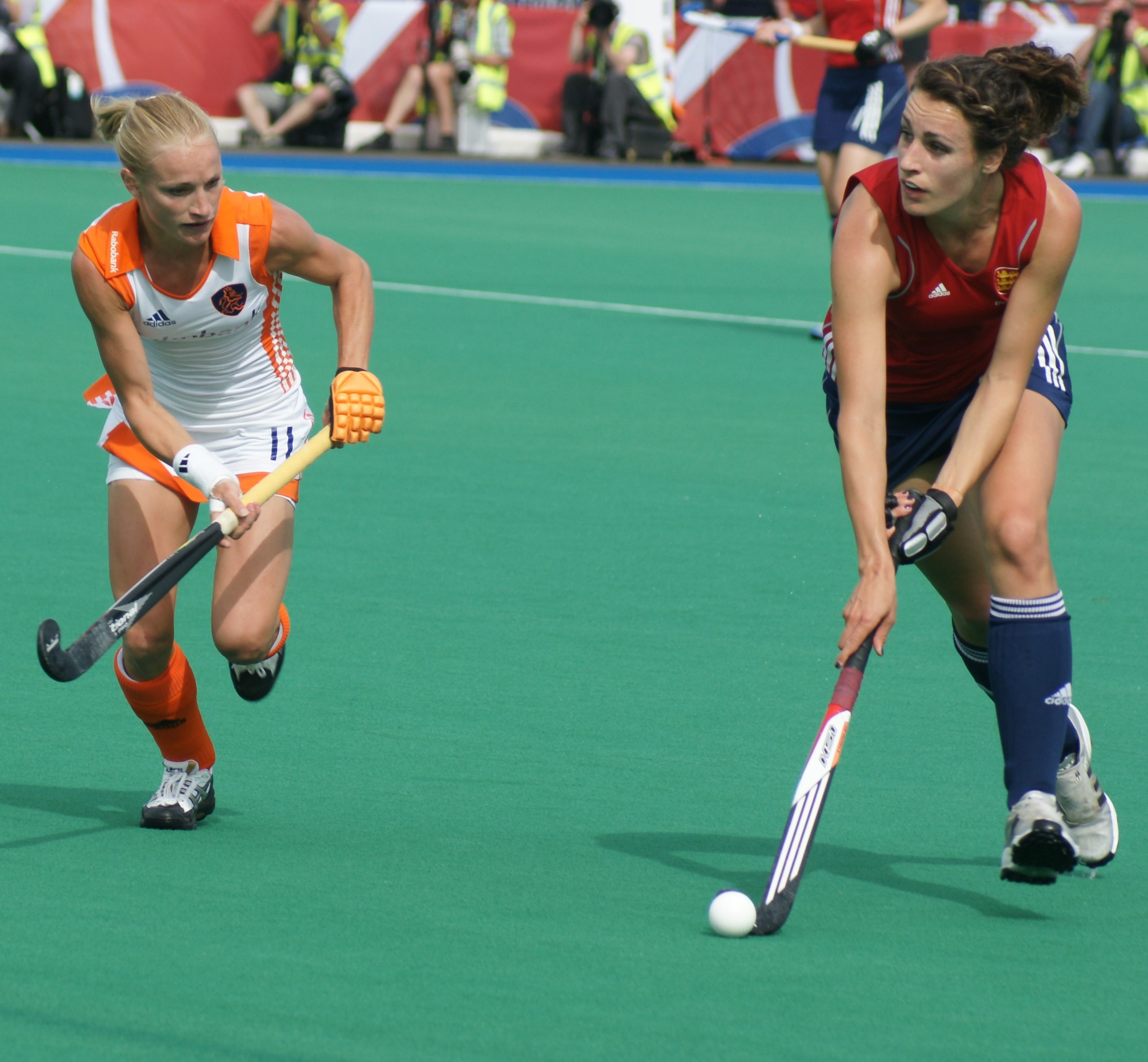 Looking to pass